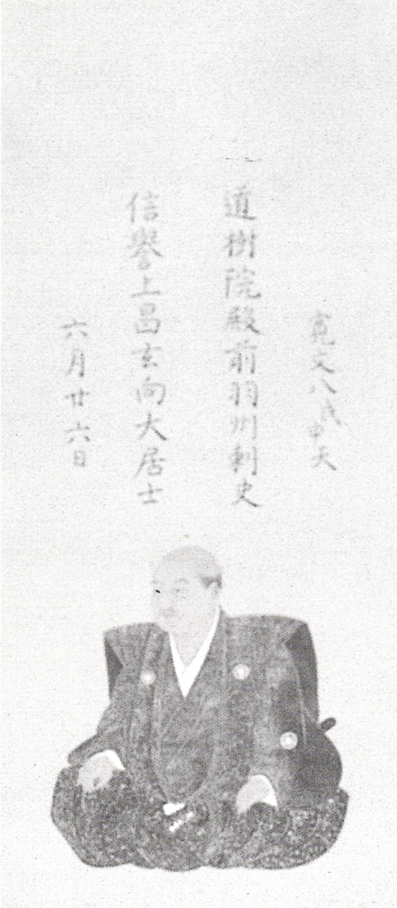 水野忠職の肖像。